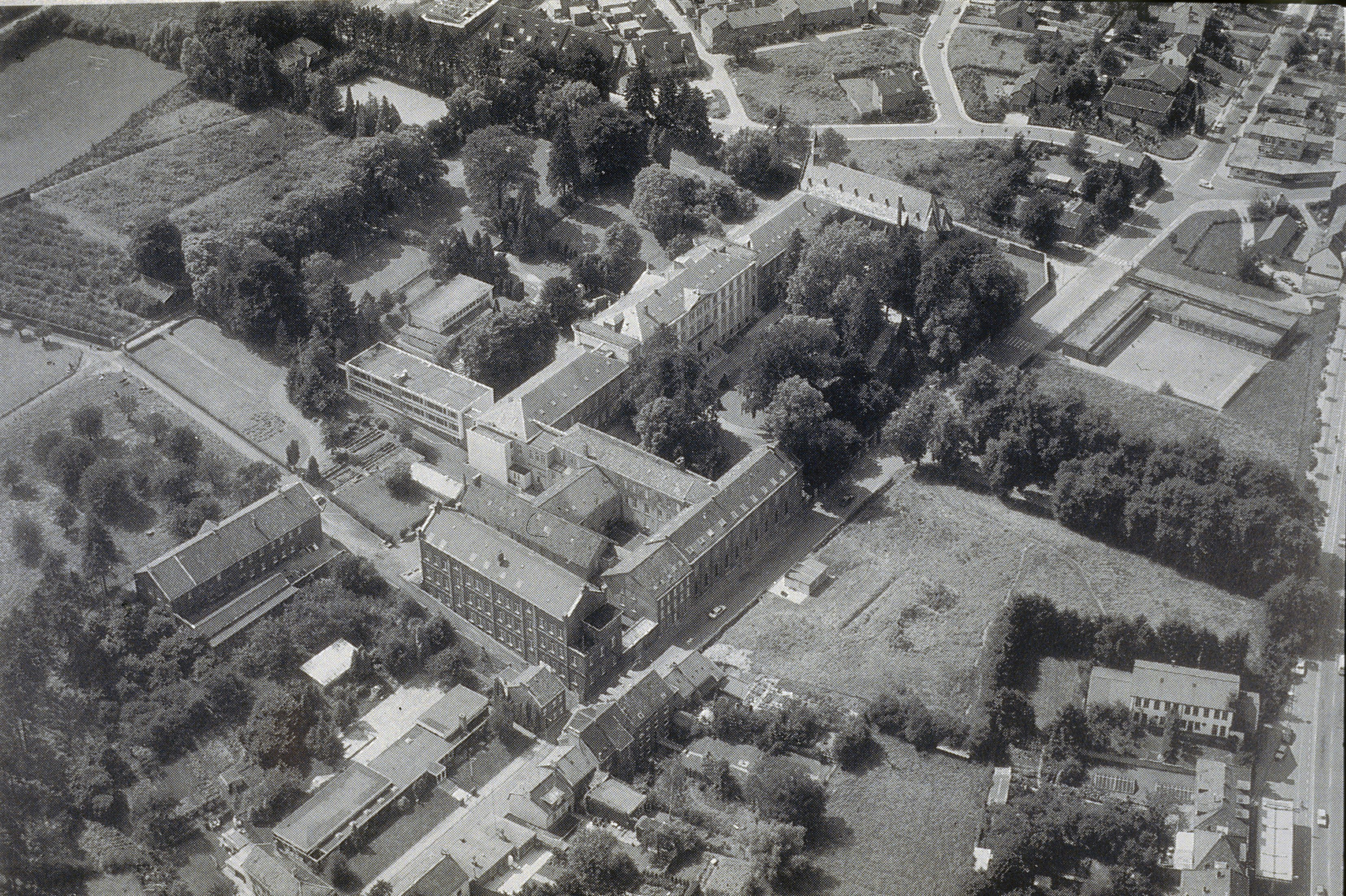 Huis Blumenthal: Luchtfoto (opmerking: Diacollectie Huub Kurvers)